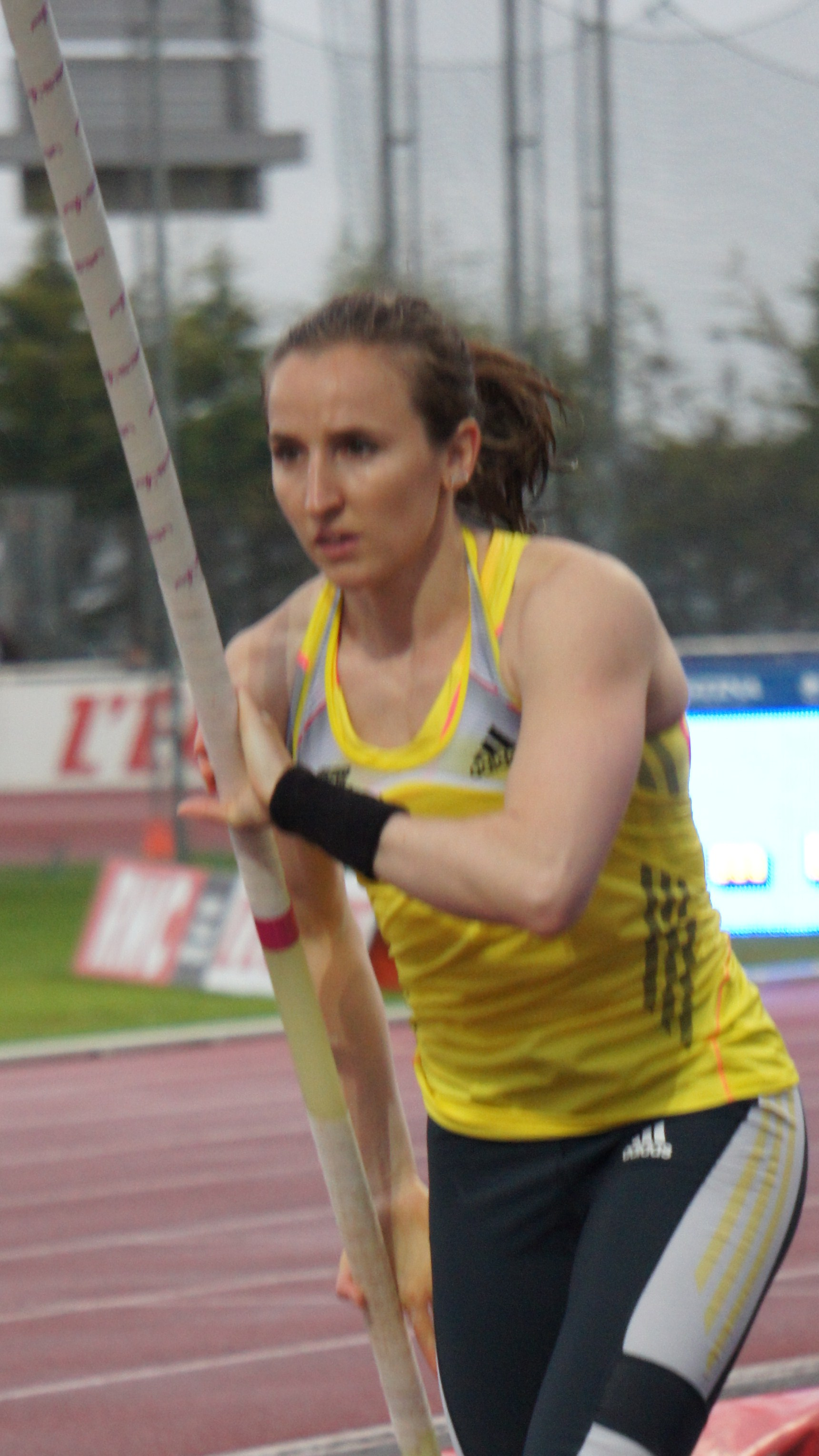 Nicole Büchler lors des Rencontres d'athlétisme de Reims 2013.